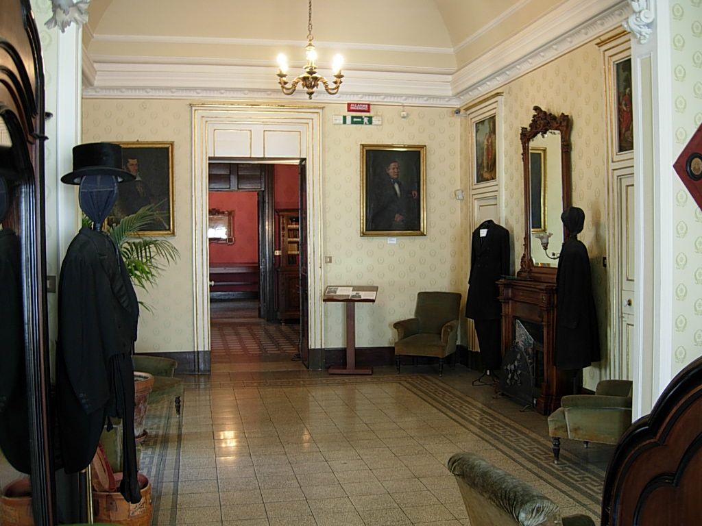 Casa di Giovanni Verga a Catania Foto personale concessa in PD